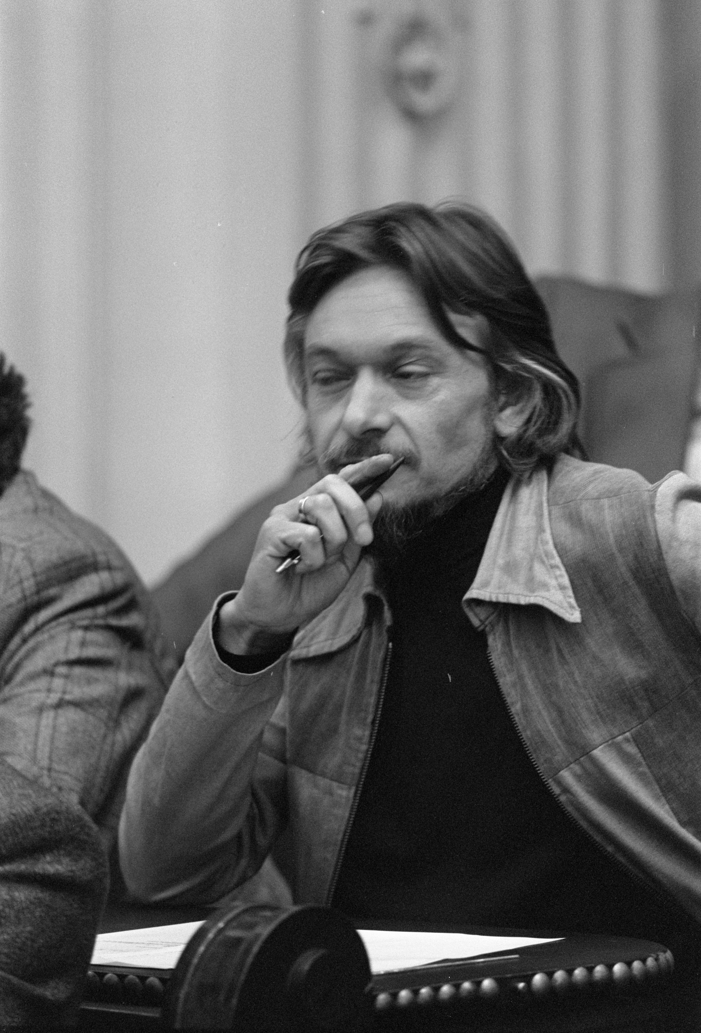 Collectie / Archief : Fotocollectie Anefo Reportage / Serie : [ onbekend ] Beschrijving : Tweede Kamer debat over buitenlandse werknemers; Van de Lek (PSP) Datum : 16 oktober 1974 Locatie : Den Haag, Zuid-Holland Trefwoorden : parlementaire debatten, parlementariërs, politiek, portretten Persoonsnaam : Lek, Bram van der Instellingsnaam : PSP Fotograaf : Peters, Hans / Anefo Auteursrechthebbende : Nationaal Archief Materiaalsoort : Negatief (zwart/wit) Nummer archiefinventaris : bekijk toegang 2.24.01.05 Bestanddeelnummer : 927-5180